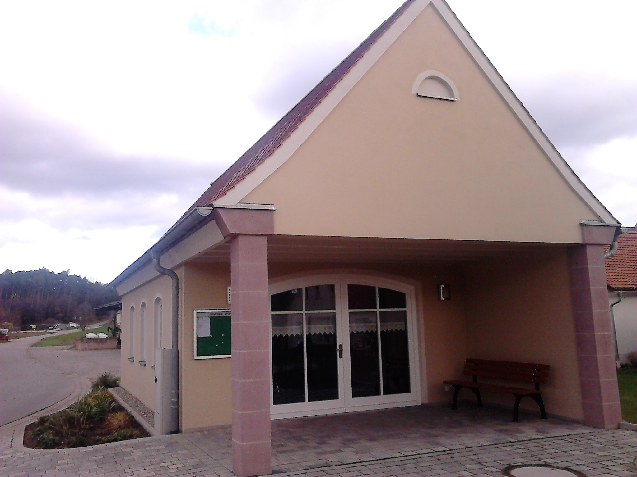 Gemeindehaus Gundelshalm im November 2015